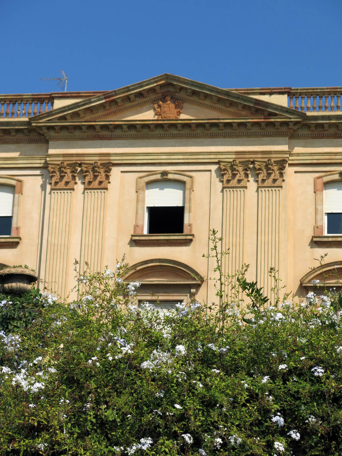 Cal Pallejà (Montgat) Object location41° 28′ 11.97″ N, 2° 17′ 13.41″ E